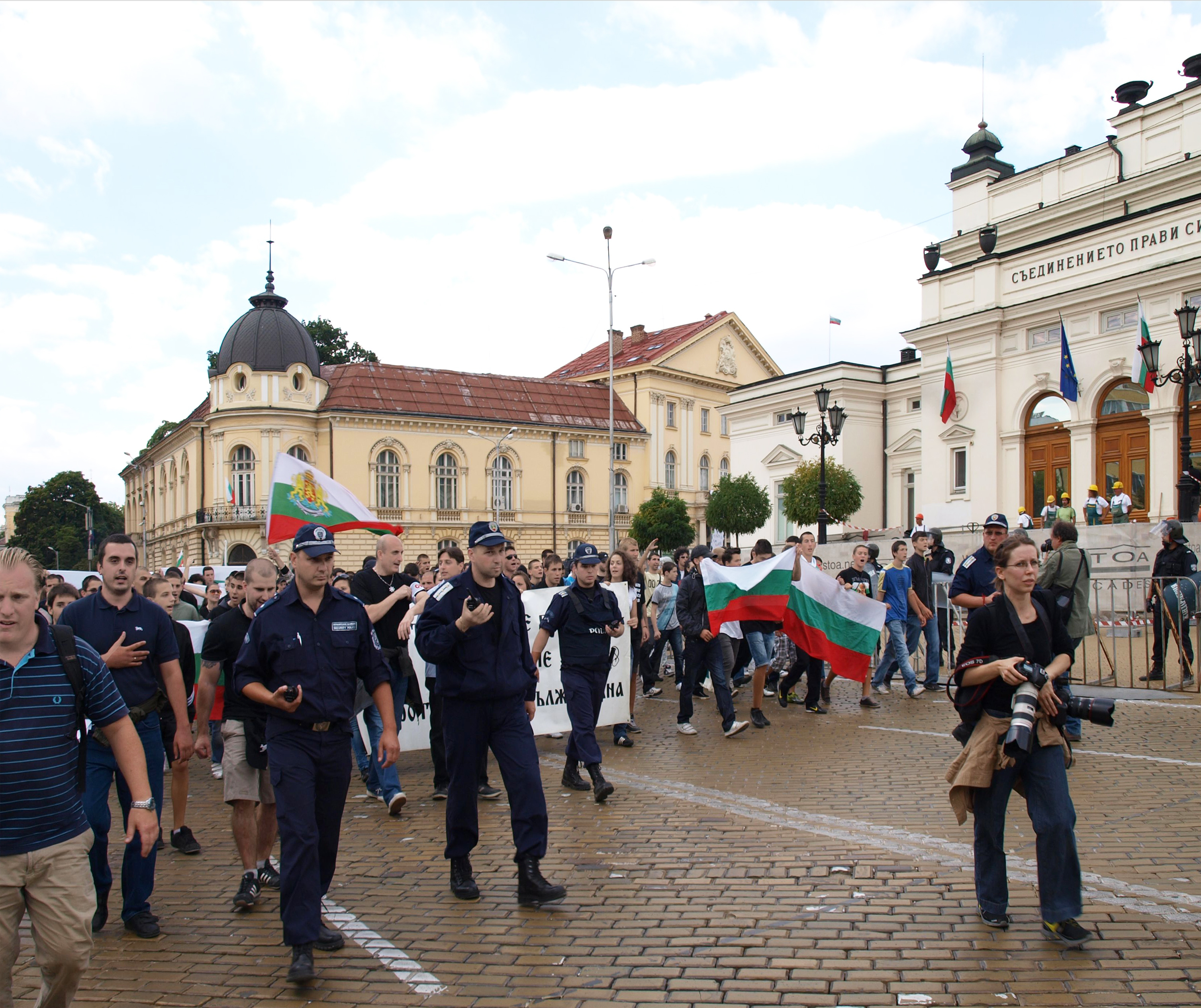 Протест срещу циганската престъпност в София.